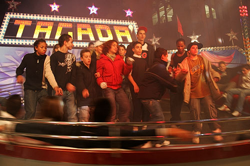 Basler Herbstmesse 2005: Ramsauers "Tagada Show"